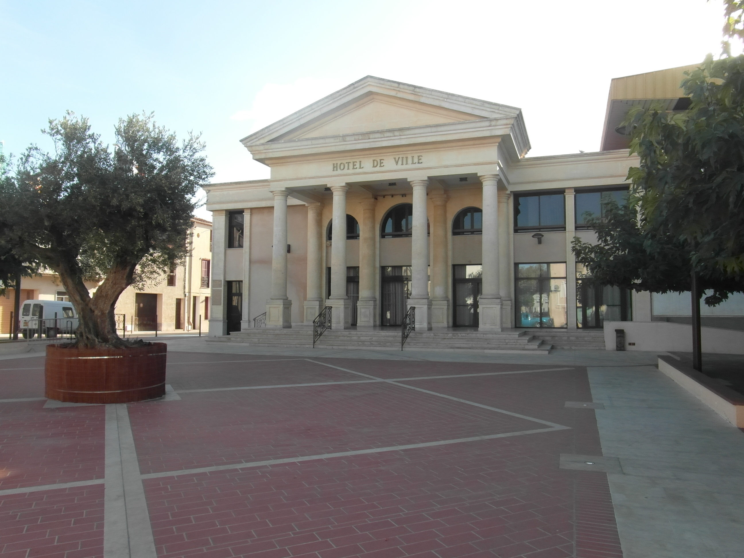 Mairie de Le Soler (66)